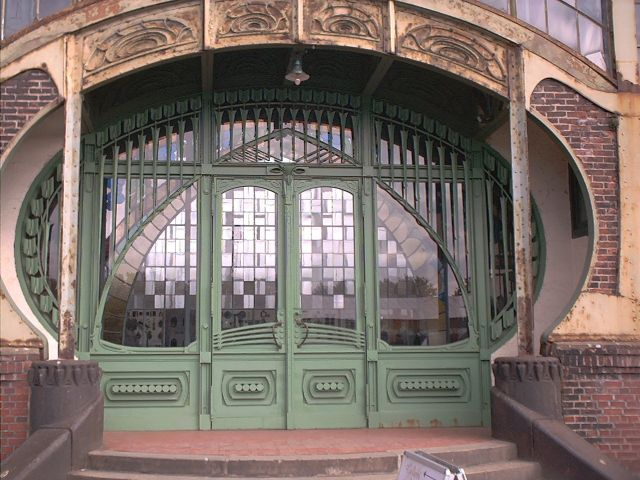 Eingangsportal Zeche Zollern II/IV, Dortmund-Bövinghausen, Deutschland